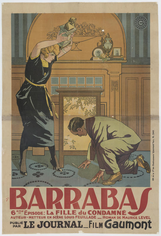 Affiche du sixième épisode de Barrabas, ciné-roman en 12 épisodes de Louis Feuillade, publié par Le Journal d'après la série de films Gaumont.